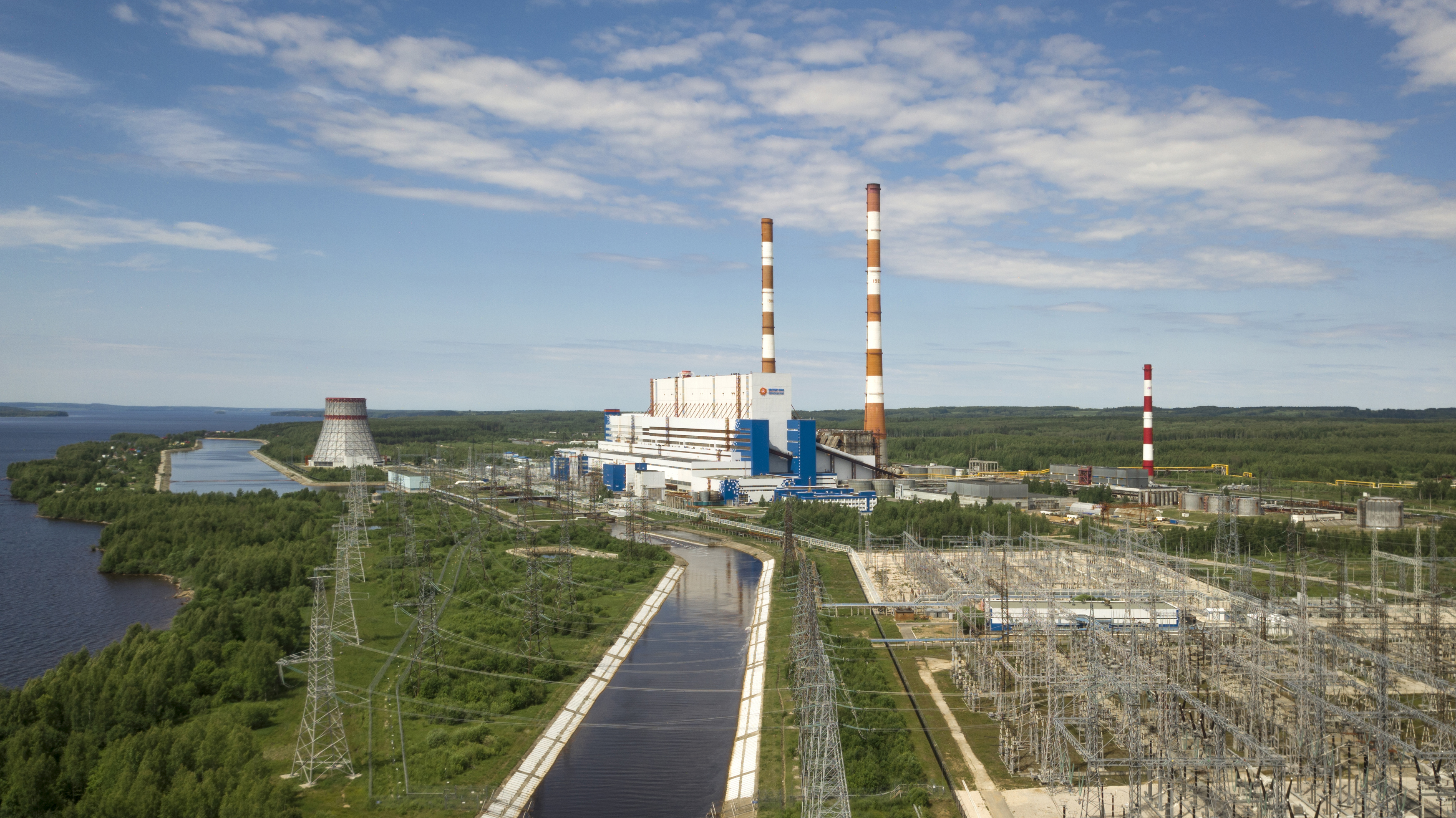 Панорамный вид на Пермскую ГРЭС